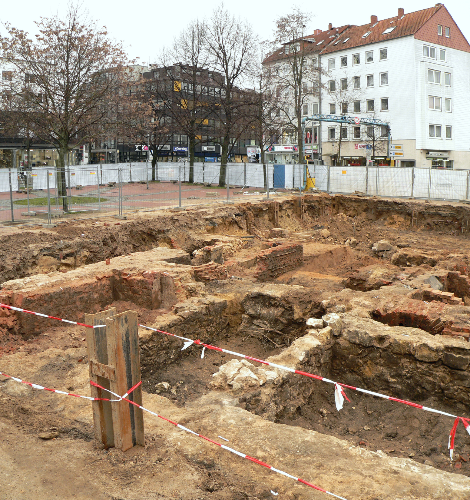 Ausgrabungsfläche auf dem Marstallplatz im östlichen Bereich